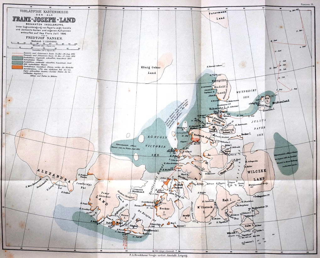 Nansens Karte von Franz-Joseph-Land (1896)